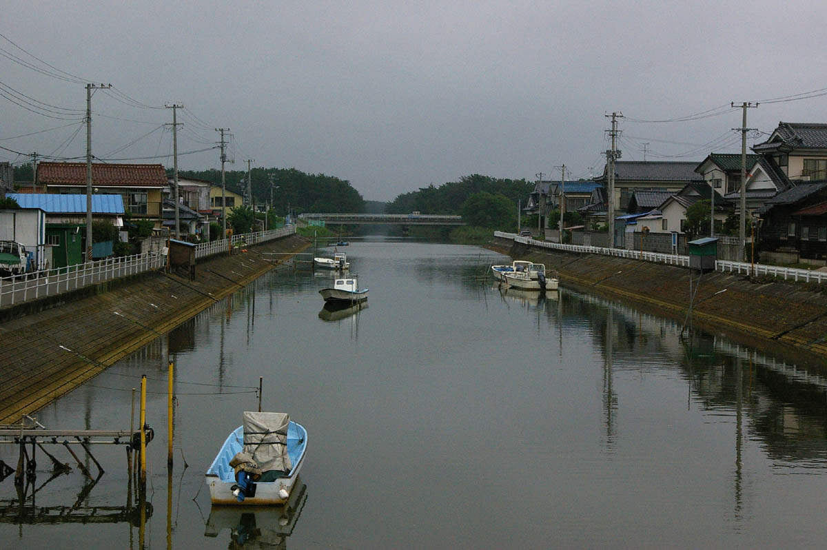 Teizan Canal 日本 宮城県仙台市若林区 貞山運河